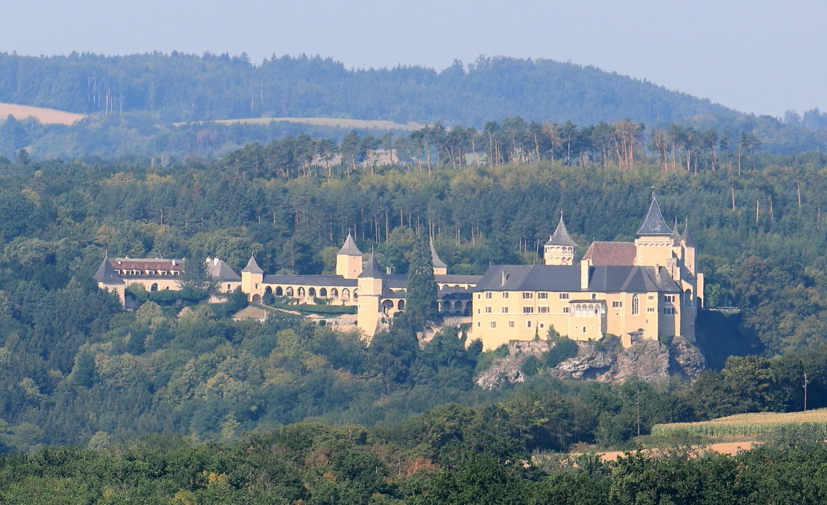 Ostnordostansicht des Schlosses Rosenburg in Rosenburg, ein Ortsteil der niederösterreichischen Gemeinde Rosenburg-Mold.Ursprünglich eine mächtige mittelalterliche Burg in Berglage über dem Kampufer. Ende des 16. Jahrhunderts erfolgte ein Umbau zu einem Renaissanceschloss und in der 2. Hälfte des 17. Jahrhunderts ein weiterer Ausbau. Nach einem Brand 1800 verfiel das Schloss. Zwischen 1859 und 1875 ließ Ernst Karl von Hoyos-Sprinzenstein die vom Verfall bedrohte Rosenburg nach den Darstellungen des Schlosses in der Topographia Windhagiana von 1673 orientierend, umfassend restaurieren und machte sie als eine der ersten Burgen in Österreich öffentlich zugänglich.